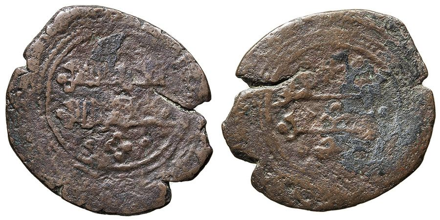 TAIFA DE TOLEDO. Al Qadir Yahya II. Dírhem. VE. V.448? Escasa. BC.